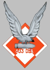 663 Dywizjon Samolotów Artylerii